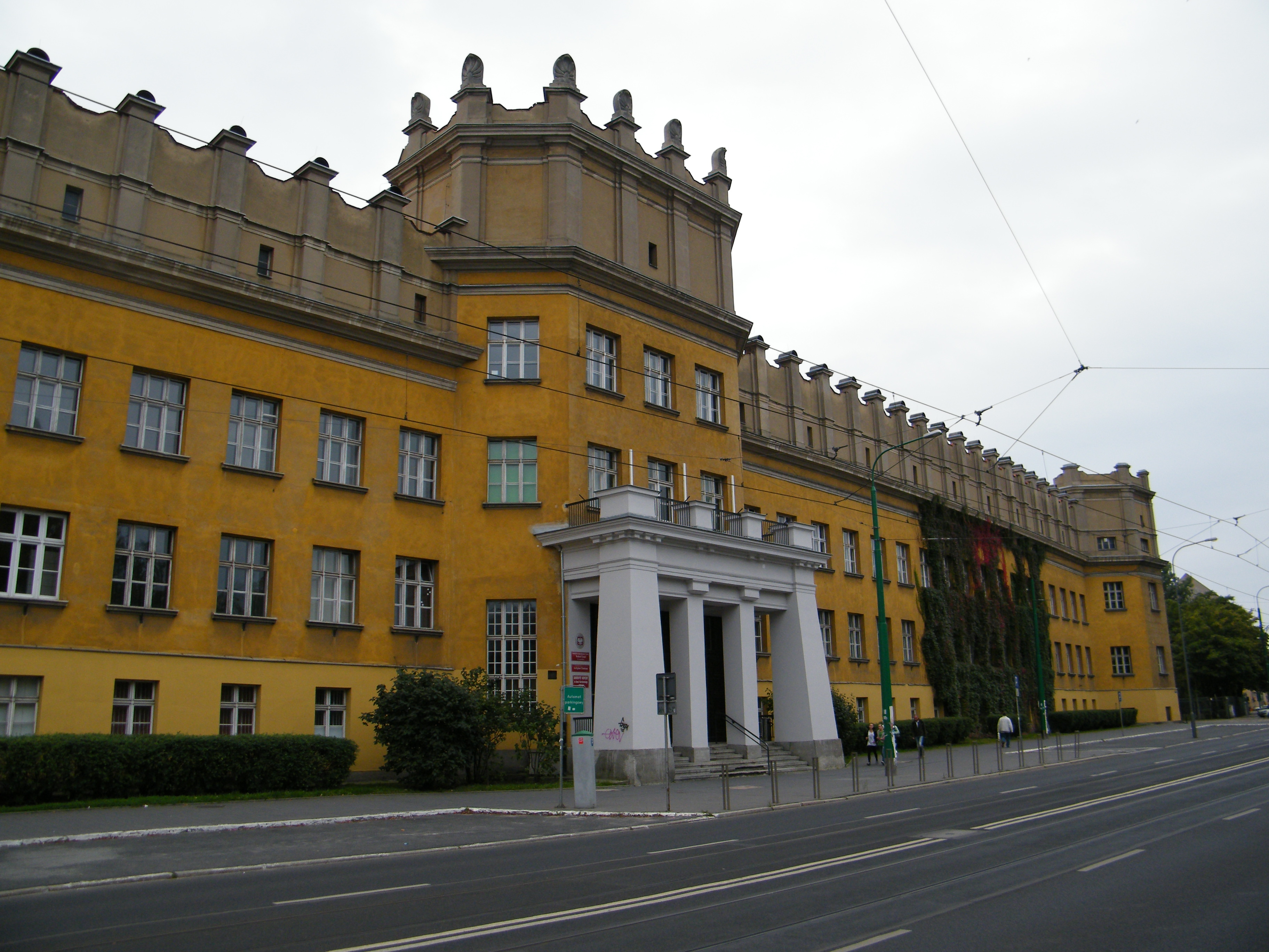 Poznań, collegium chemicum ("Pałac Rządowy"), 1920-29